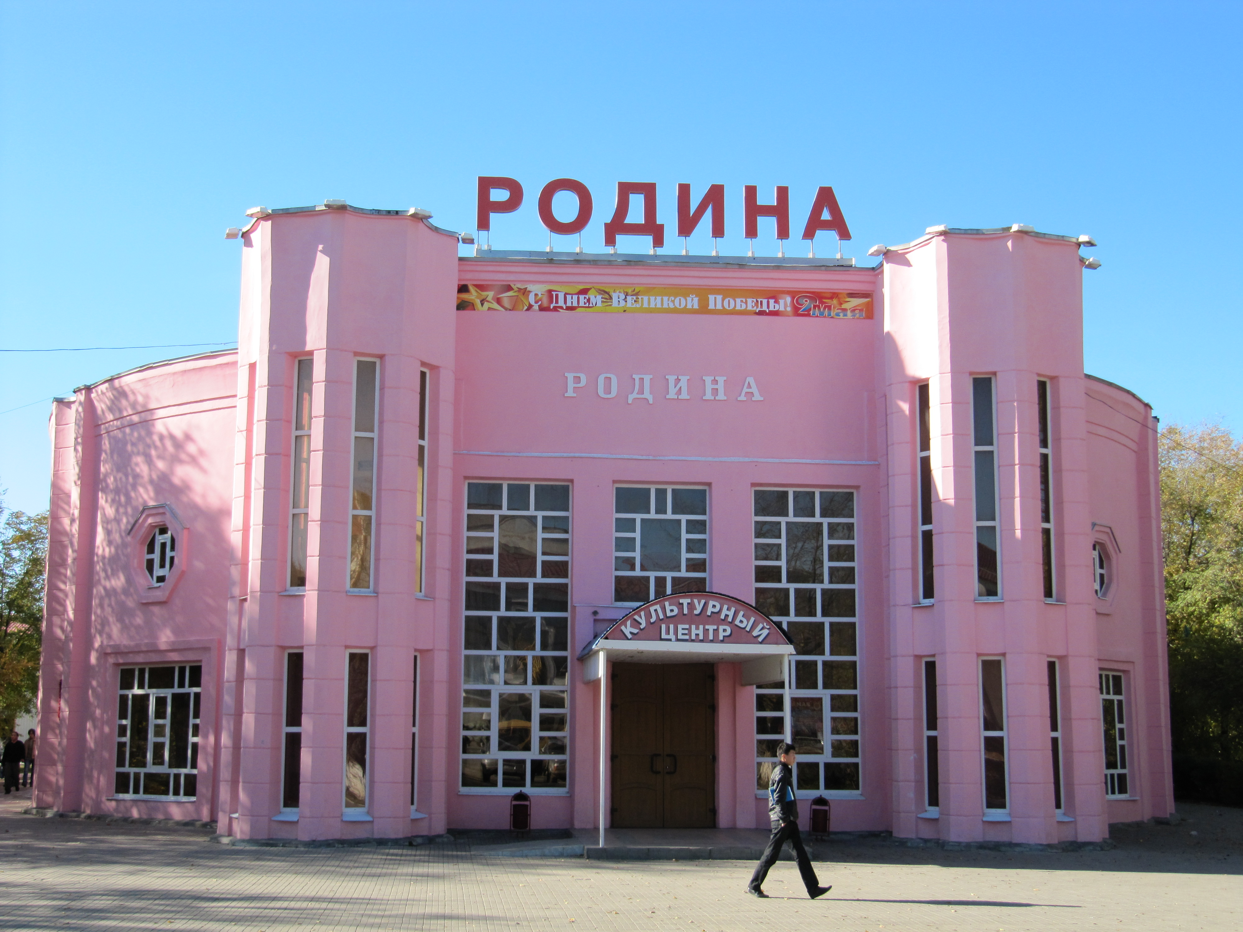 Культурный центр "Родина", улица Пушкина, 18а, Элиста, Калмыкия